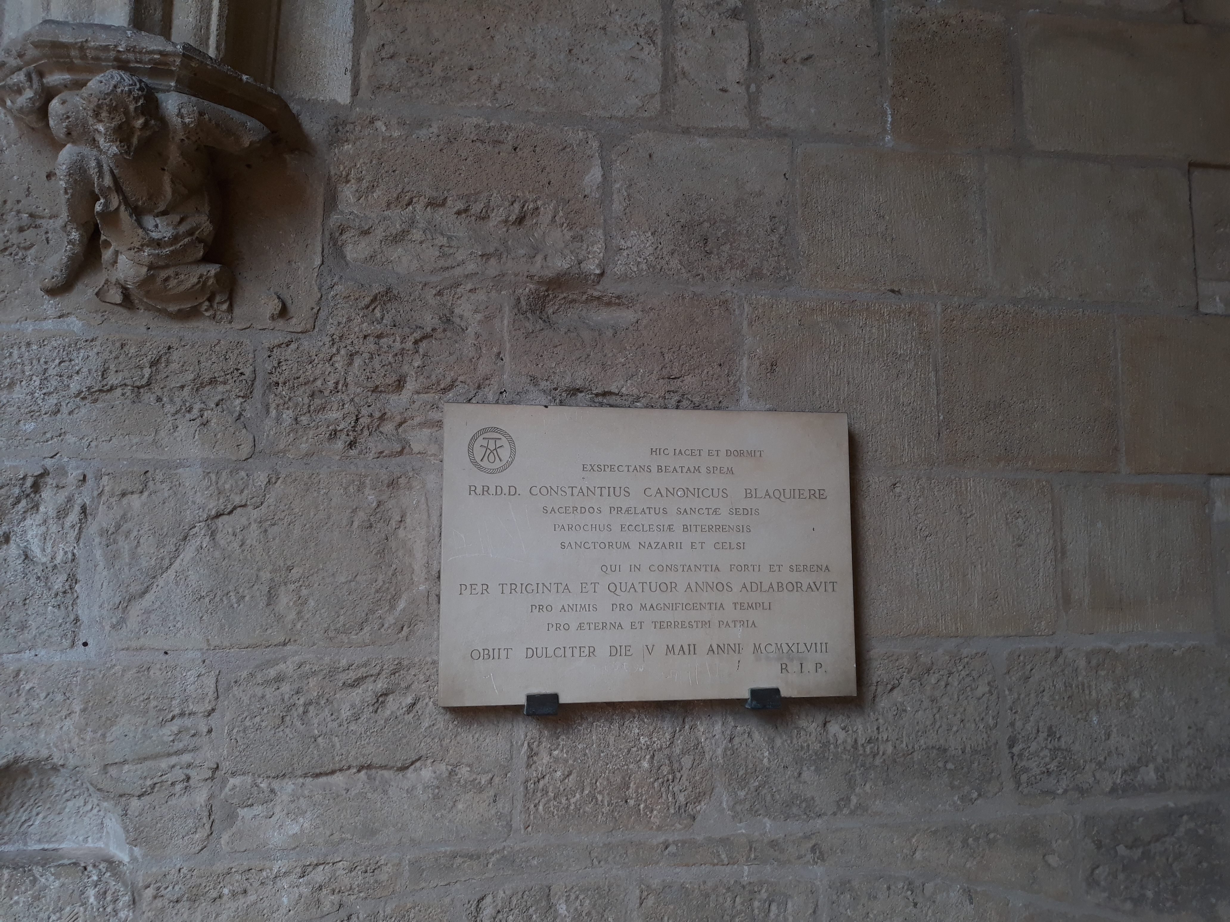 Das Grab des französischen Erzpriesters Constant Blaquiere in der Kathedrale von Béziers.